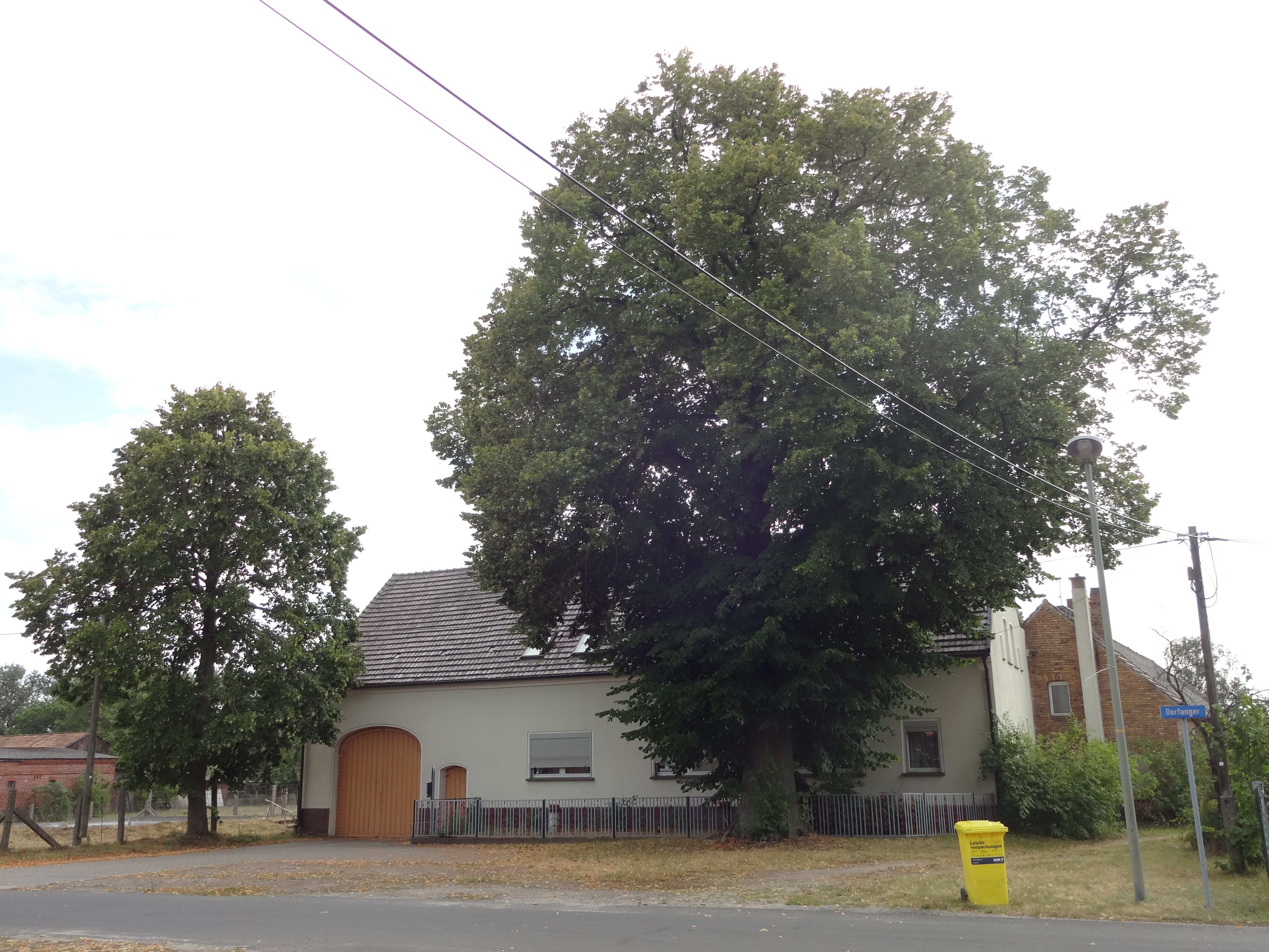 Naturdenkmal Sommerlinde vor Dorfanger 6 in Rutzkau